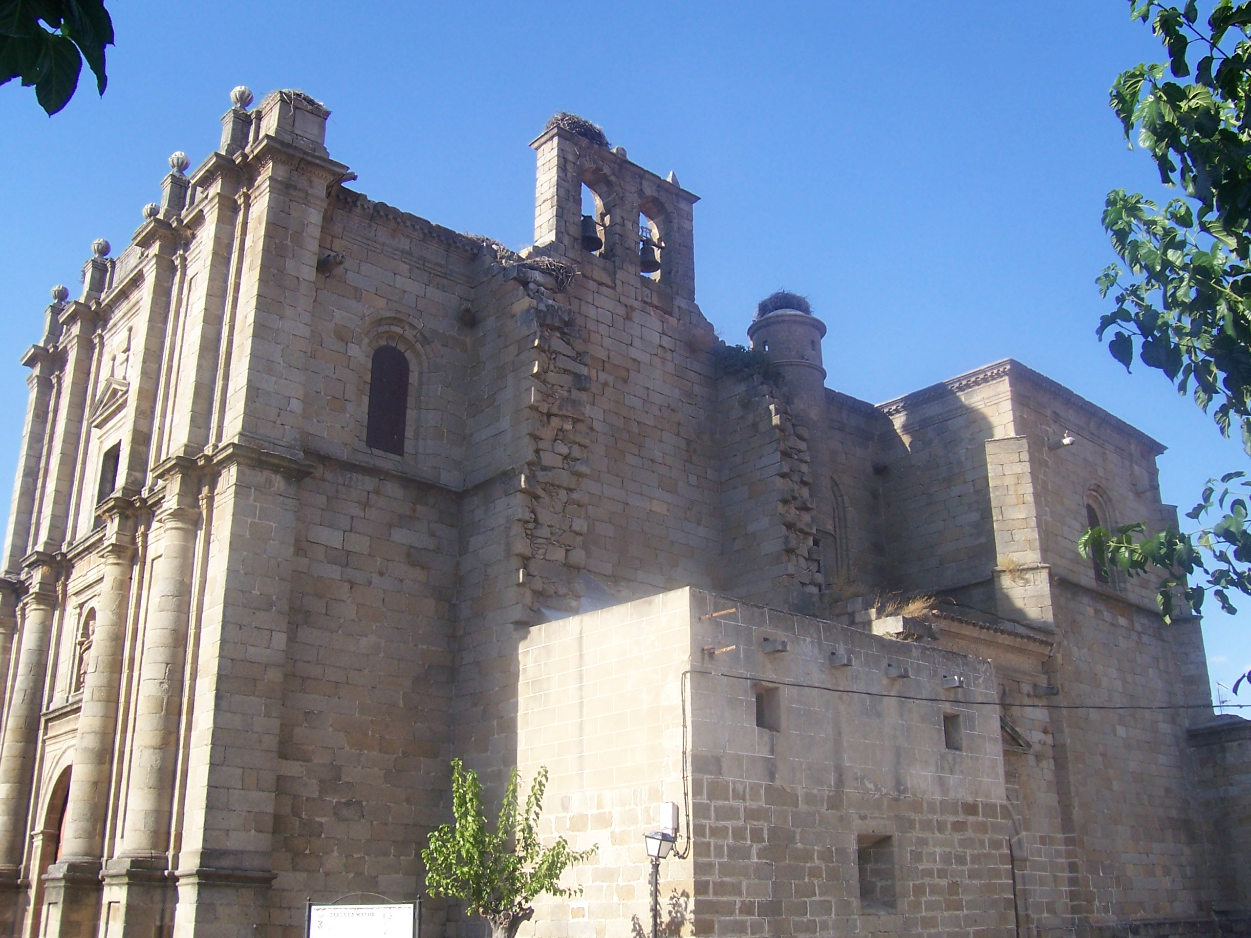 Iglesia de San Andrés, Zarza la Mayor, provincia de Cáceres, España.